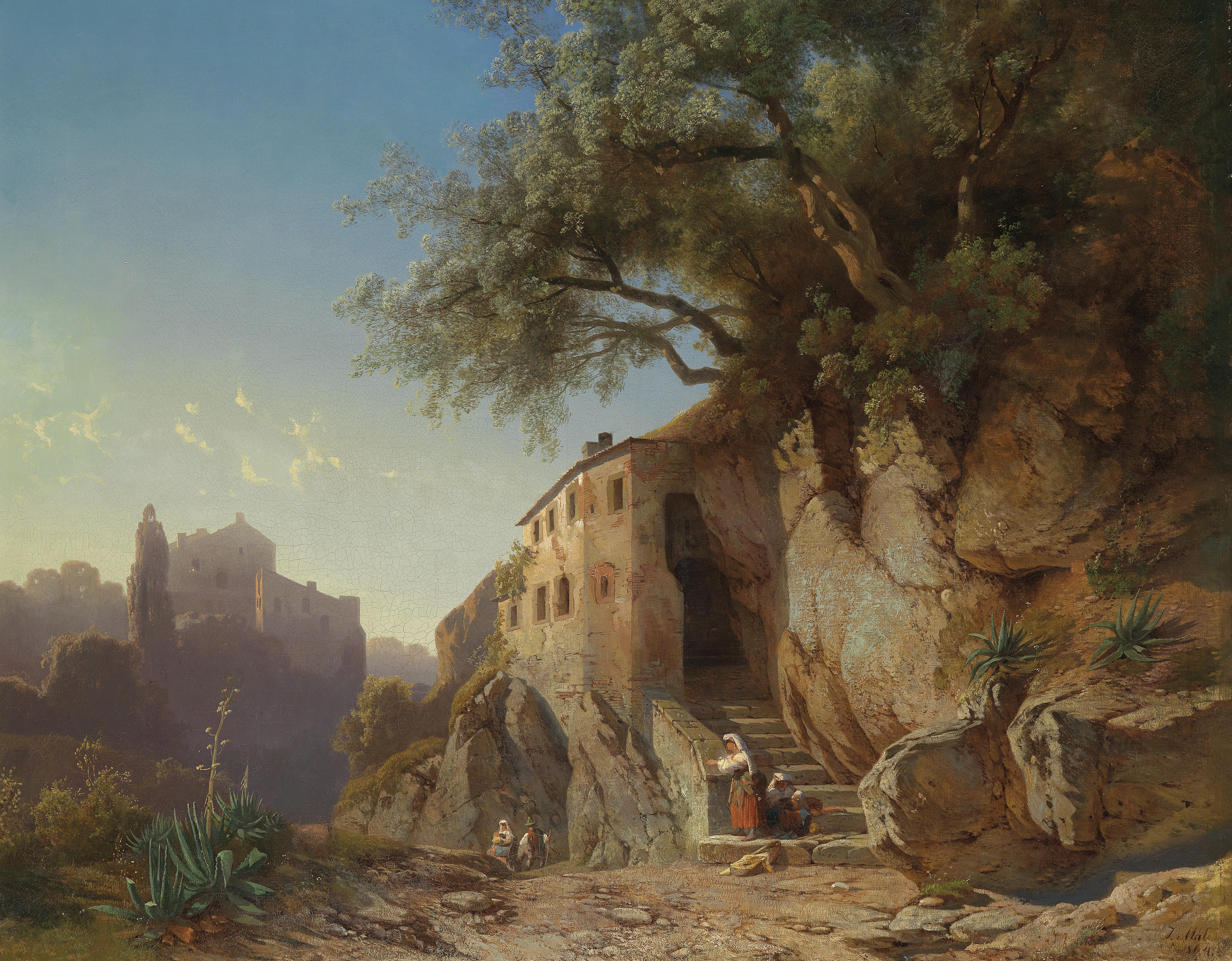 Motiv aus der römischen Campagna mit Hirten, signiert, datiert J. Mali 1864, Öl auf Leinwand, 78,5 x 98 cm